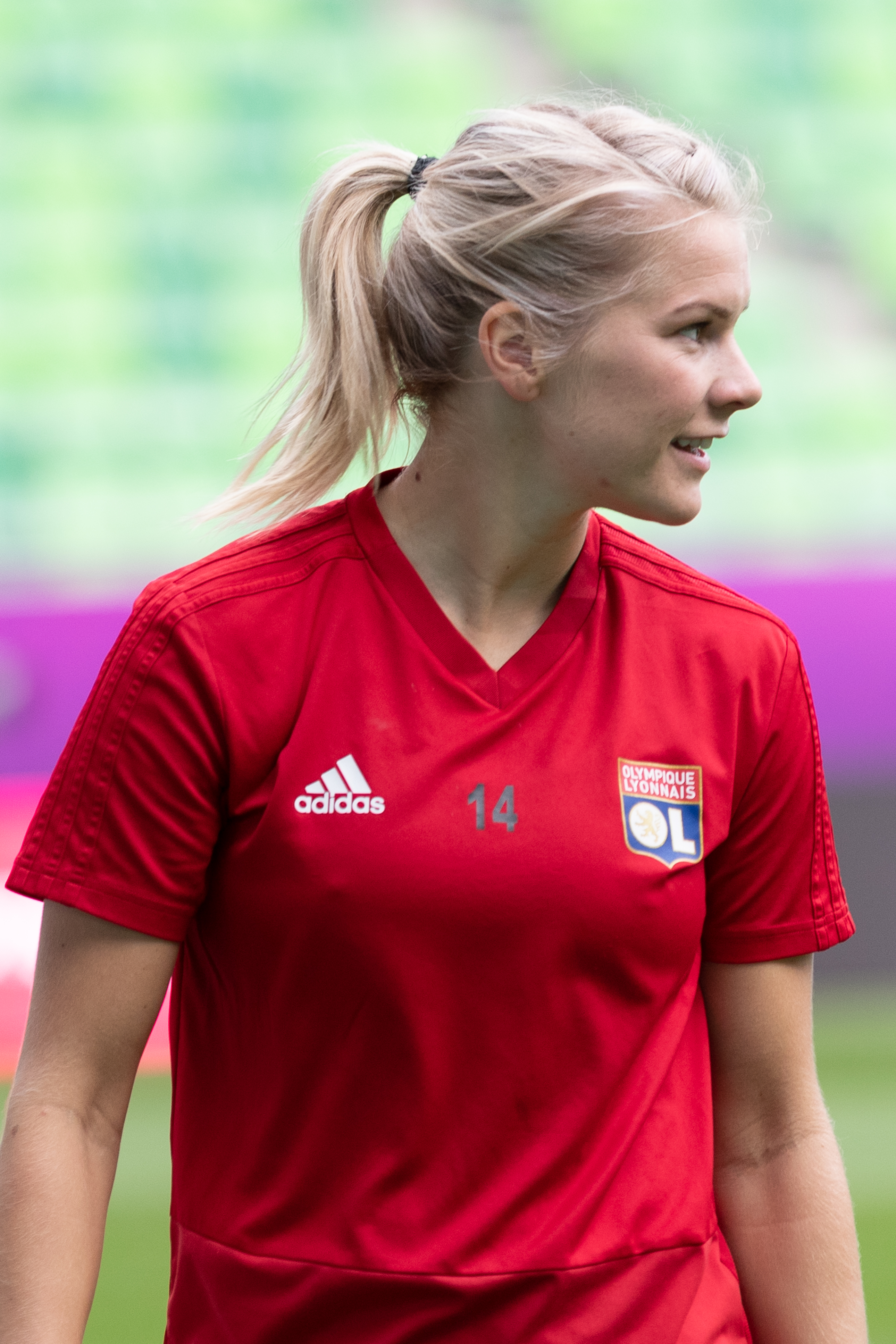 Fußball, Frauen, UEFA Women's Champions League, Olympique Lyonnais - FC Barcelona; Ada Hegerberg (Olympique Lyon,14); Porträt, Einzelbild; beim Abschlusstraining